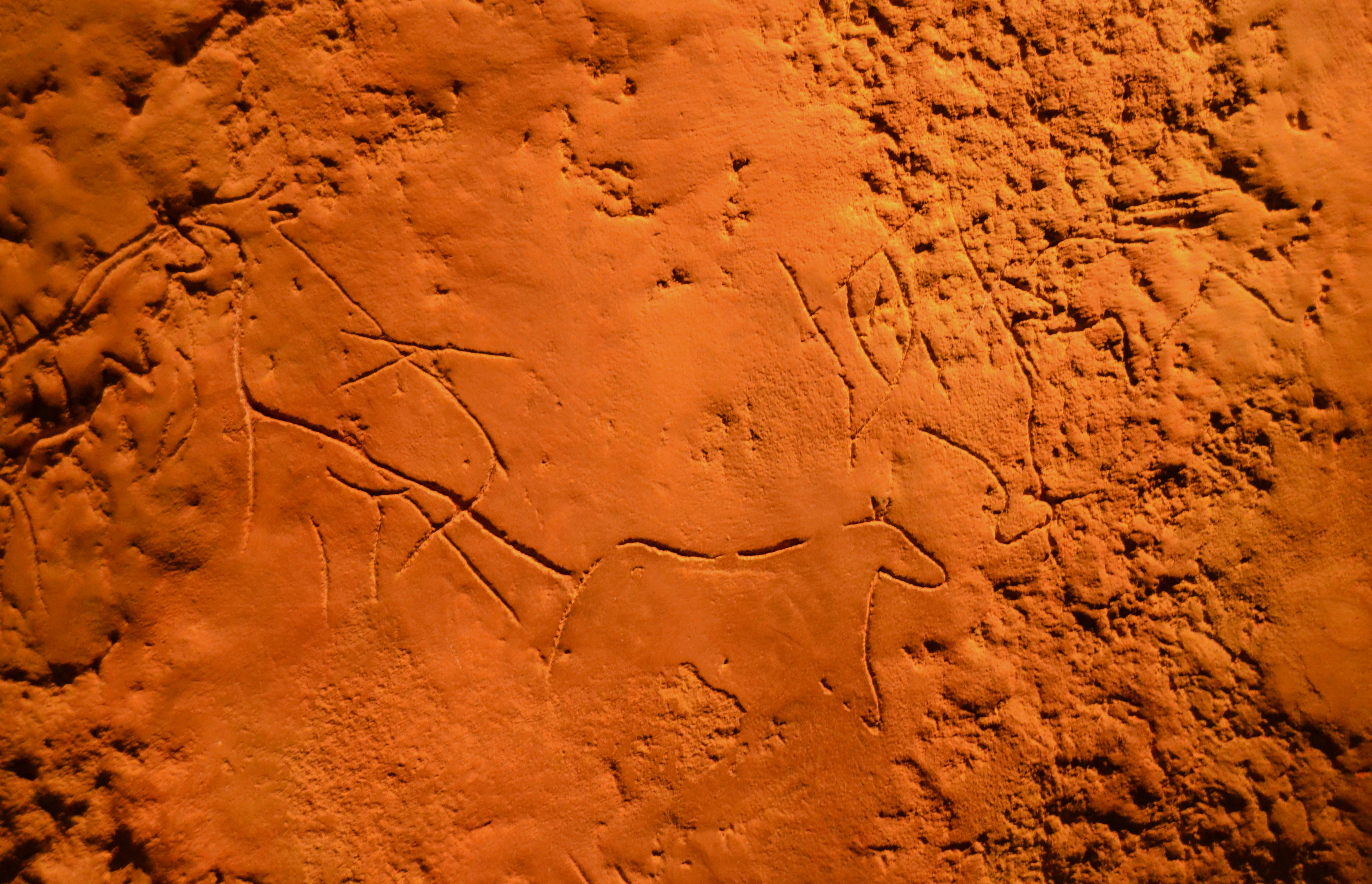 Reproducció de motius zoomòrfics i goemètrics de la cova Fosca (la Vall d'Ebo), paleolític superior. Museu Arqueològic d'Alaccant.